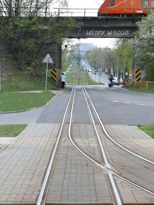 Splot torów tramwajowych o rozstawie szyn 1000 mm w Łodzi pod wiaduktem kolejowym nad ulicą Warszawską. W miejscu tym zastosowano splot ze względu na zwężenie ulicy wynikające z małej rozpiętości wiaduktu.